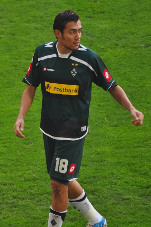 Arango im Spiel gegen Mainz 05